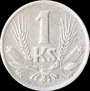 1 Slovak koruna (1942) - reverse